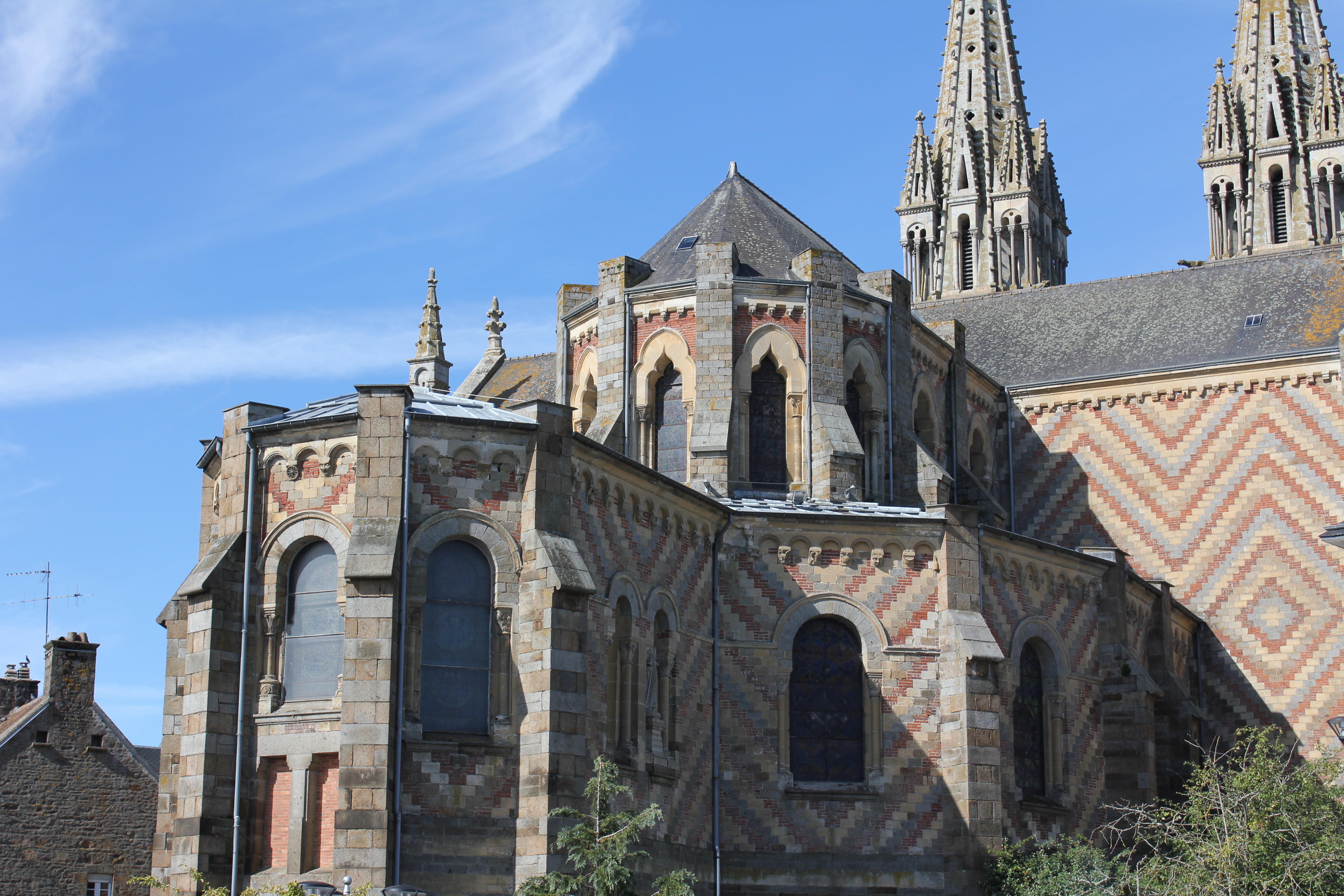 Église Notre-Dame-de-l'Assomption de la Ferté-Macé (France). Cœur.